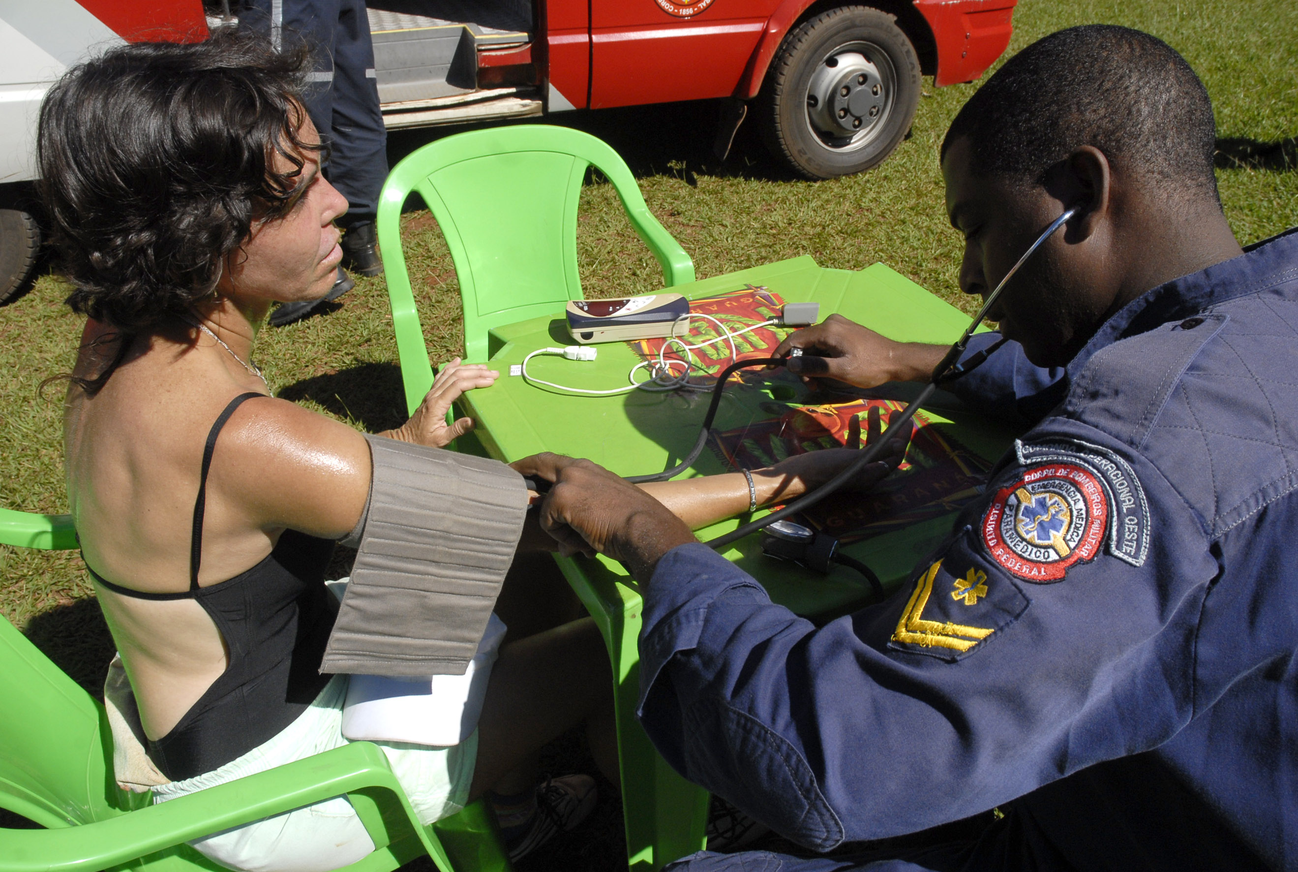 medem a pressão de uma freqüentadora do Parque